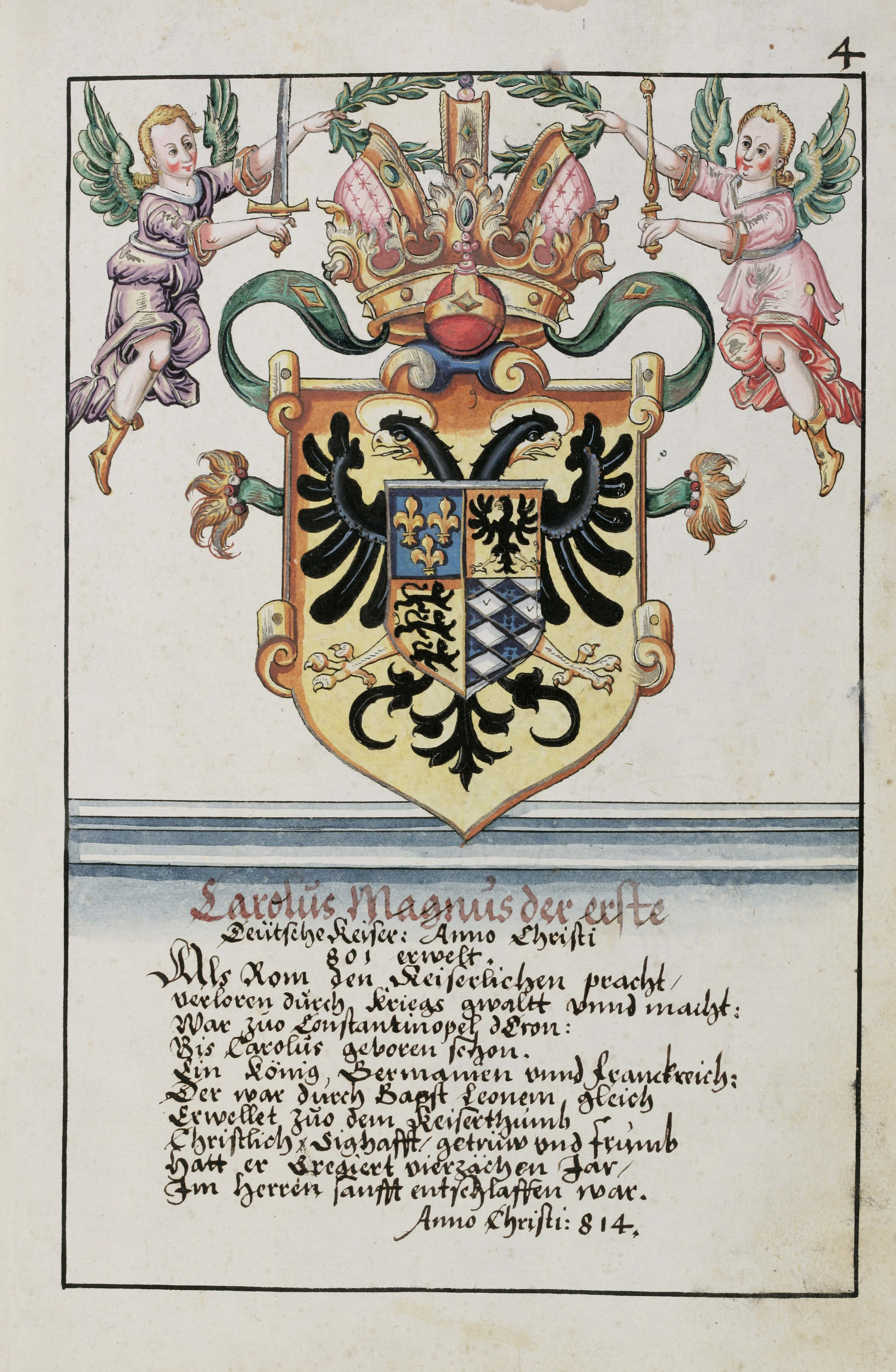 Wappenbuch des Hans Ulrich Fisch. Papier, 31.5 x 19.5 cm, Aarau 1627. Aarau, Staatsarchiv Aargau, V/4-1985/0001, fol. 4r; (apokryphes) Wappen Karls des Großen